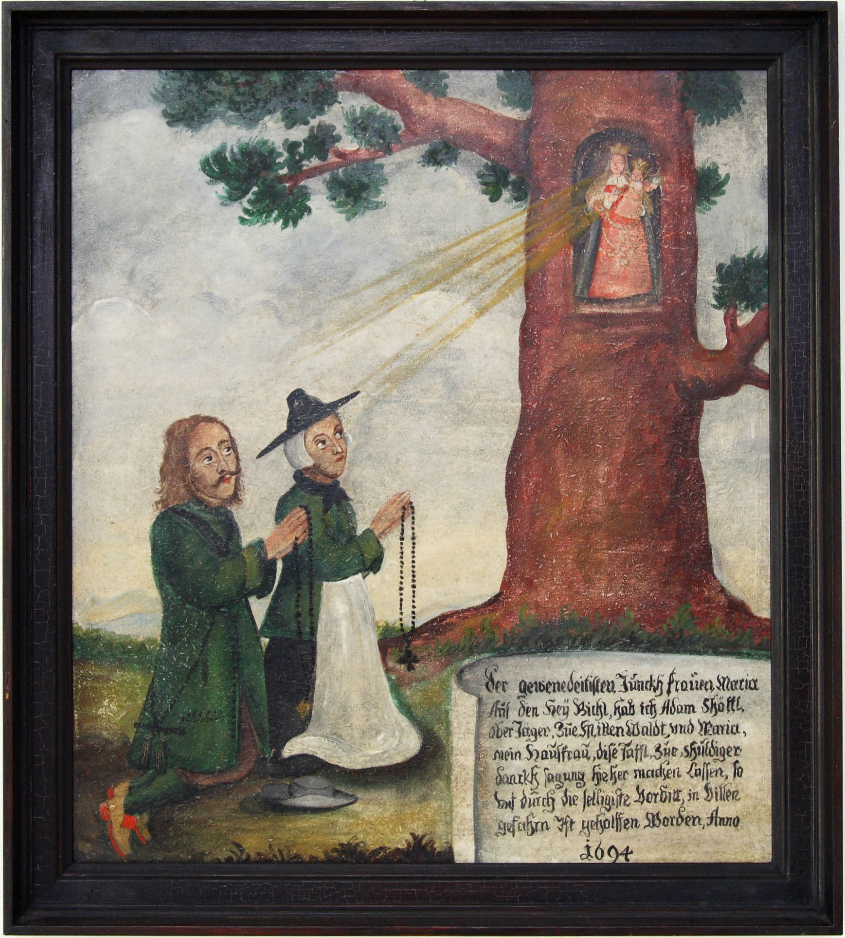 Votivtafel aus dem Jahr 1694 aus der Heuwinklkapelle in Iffeldorf. Die Tafel stammt aus der Zeit kurz vor Errichtung der Kapelle, als das Marienbild in einer hohlen Eiche aufgestellt war und zum Ziel zahlreicher Wallfahrer wurde. Nach Fertigstellung der Kapelle im Jahr 1701 wurde das Marienbild dort aufgestellt. Die Votivtafel hängt heute im Vorraum der Kapelle.